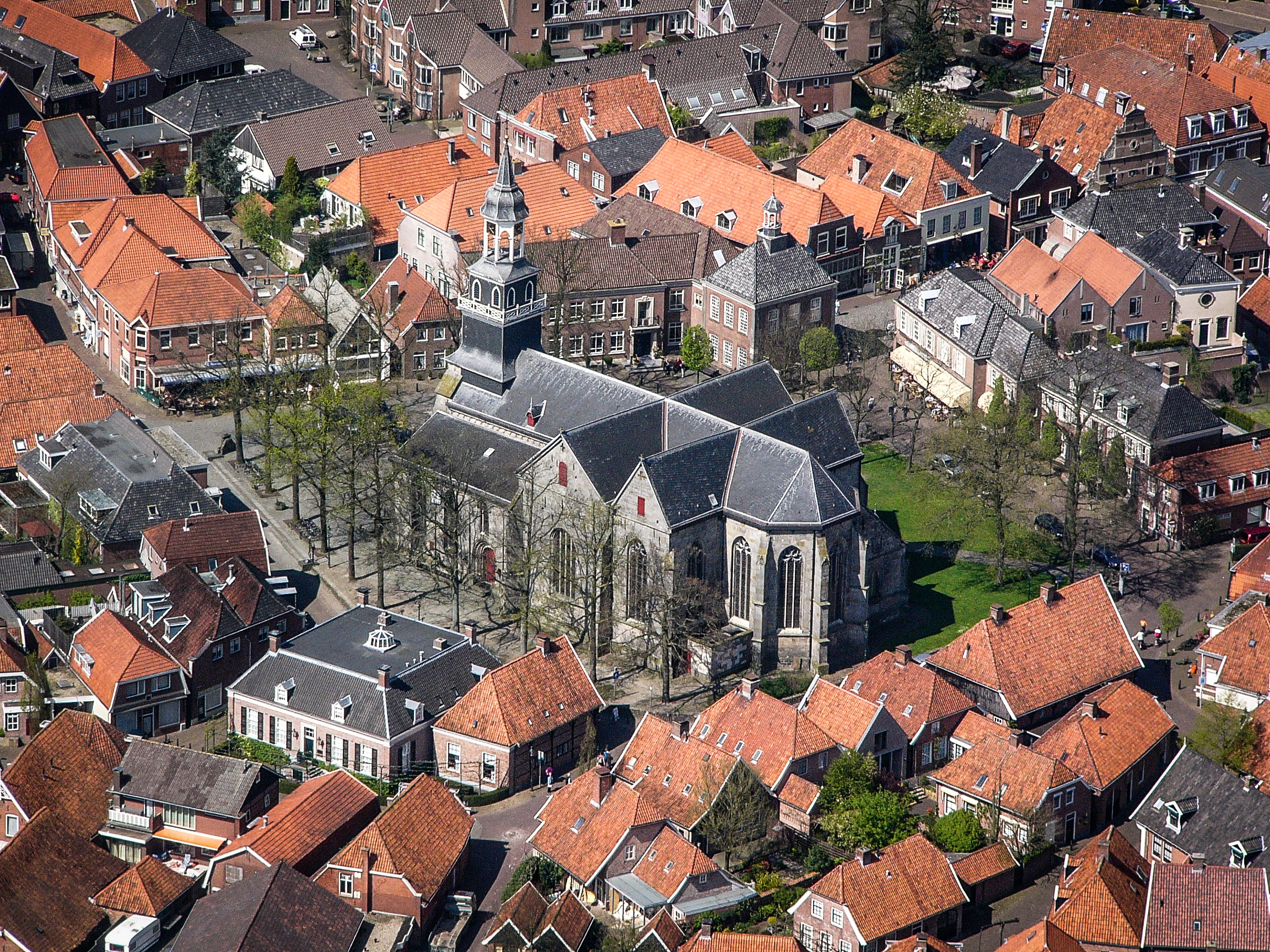 Ootmarsum Kerkplein luchtfoto 22 april 2005